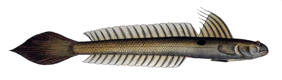 Gobionellus oceanicus